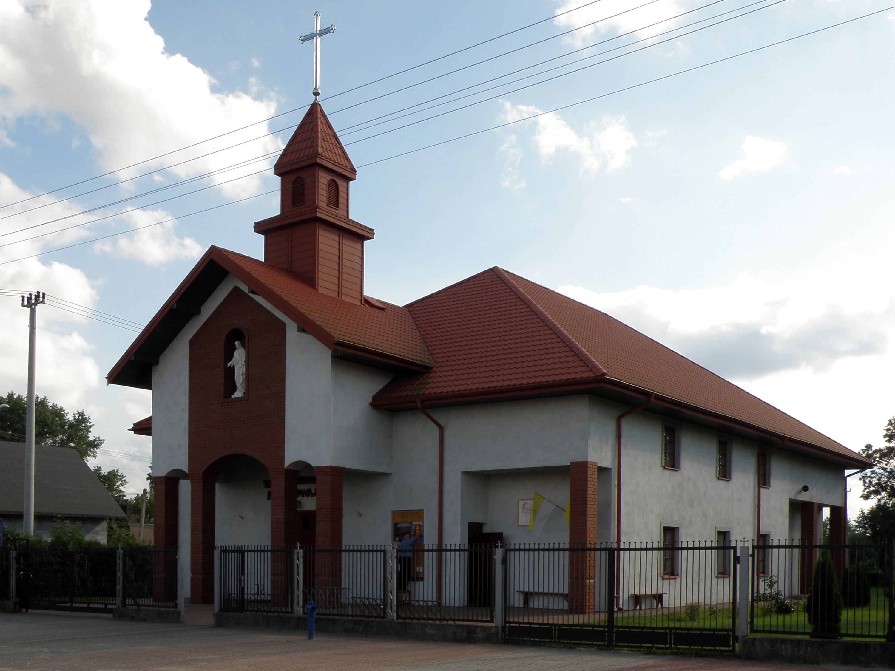 Sobiekursk - województwo mazowieckie, powiat otwocki, gmina Karczew.